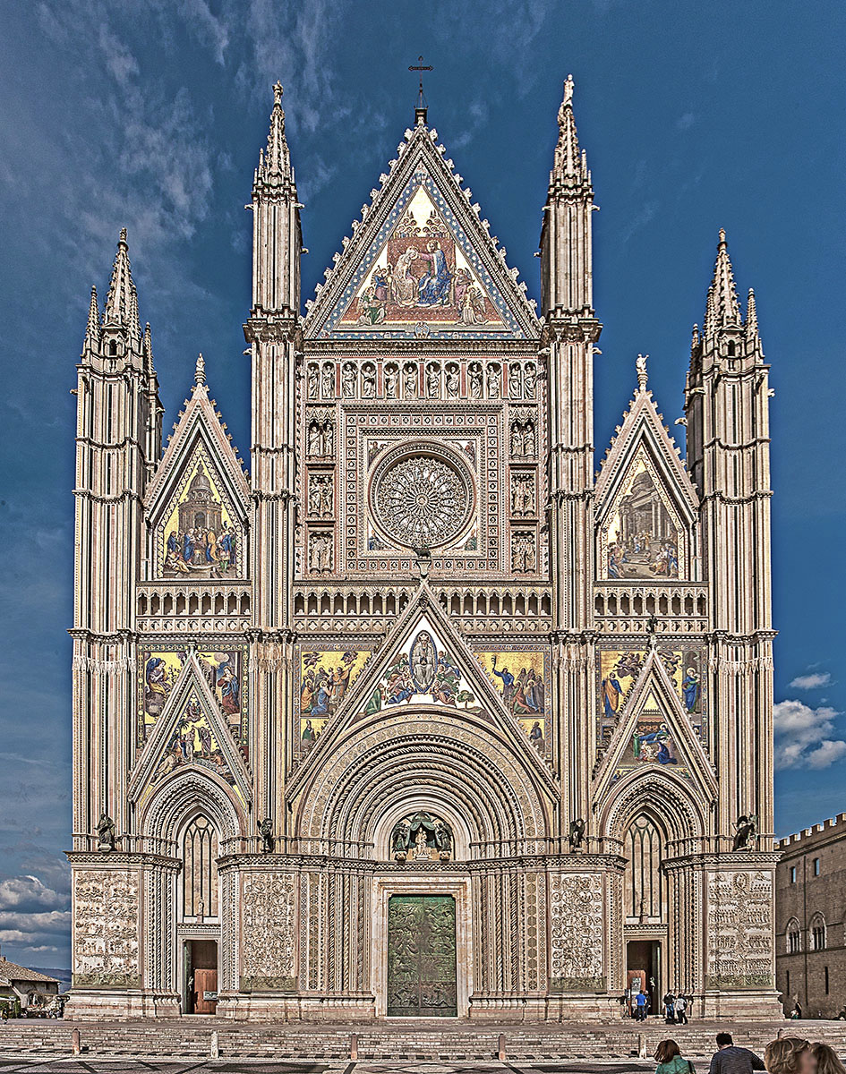 La facciata del Duomo